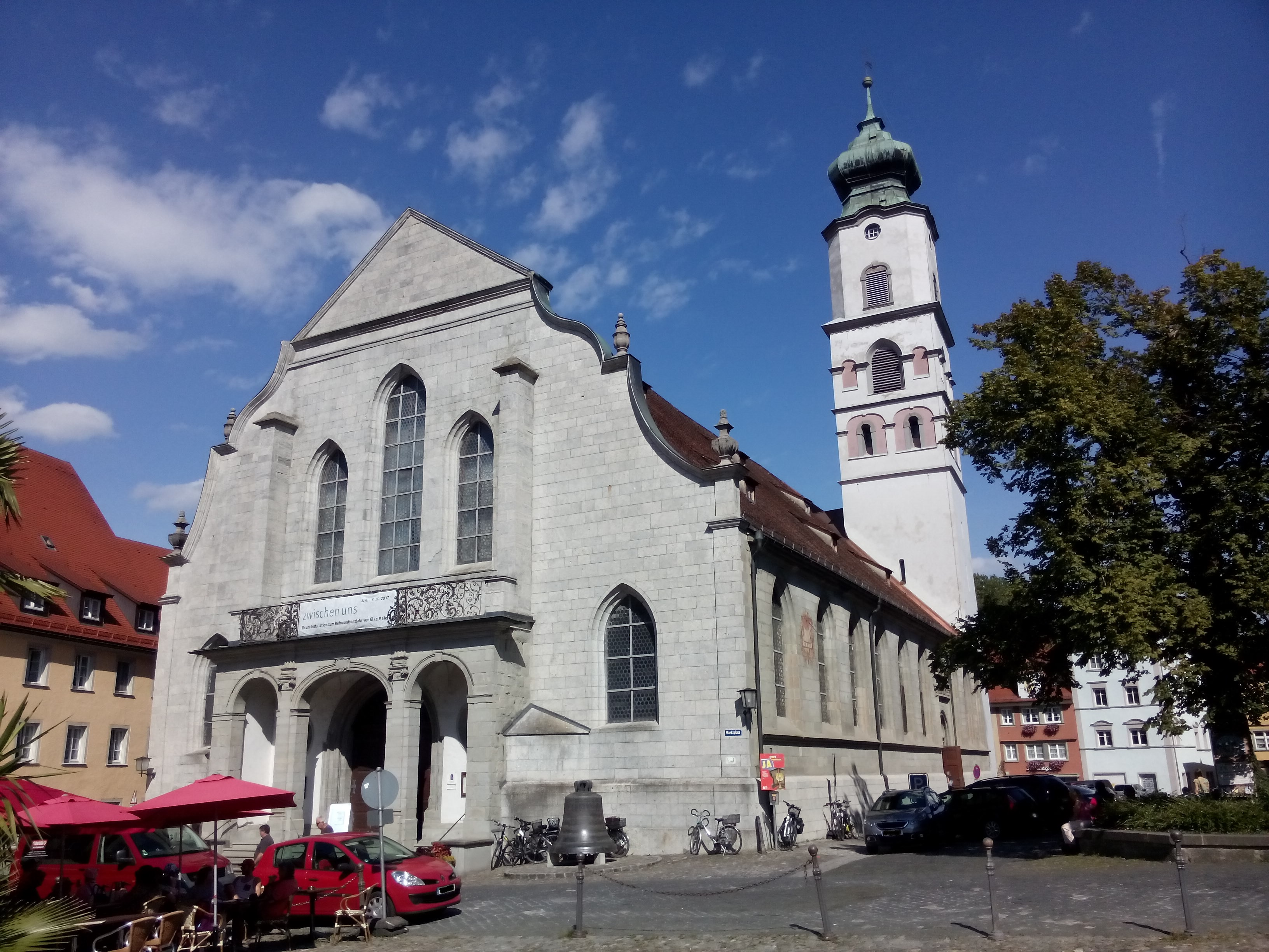 Evang. Kirche - Außenansicht